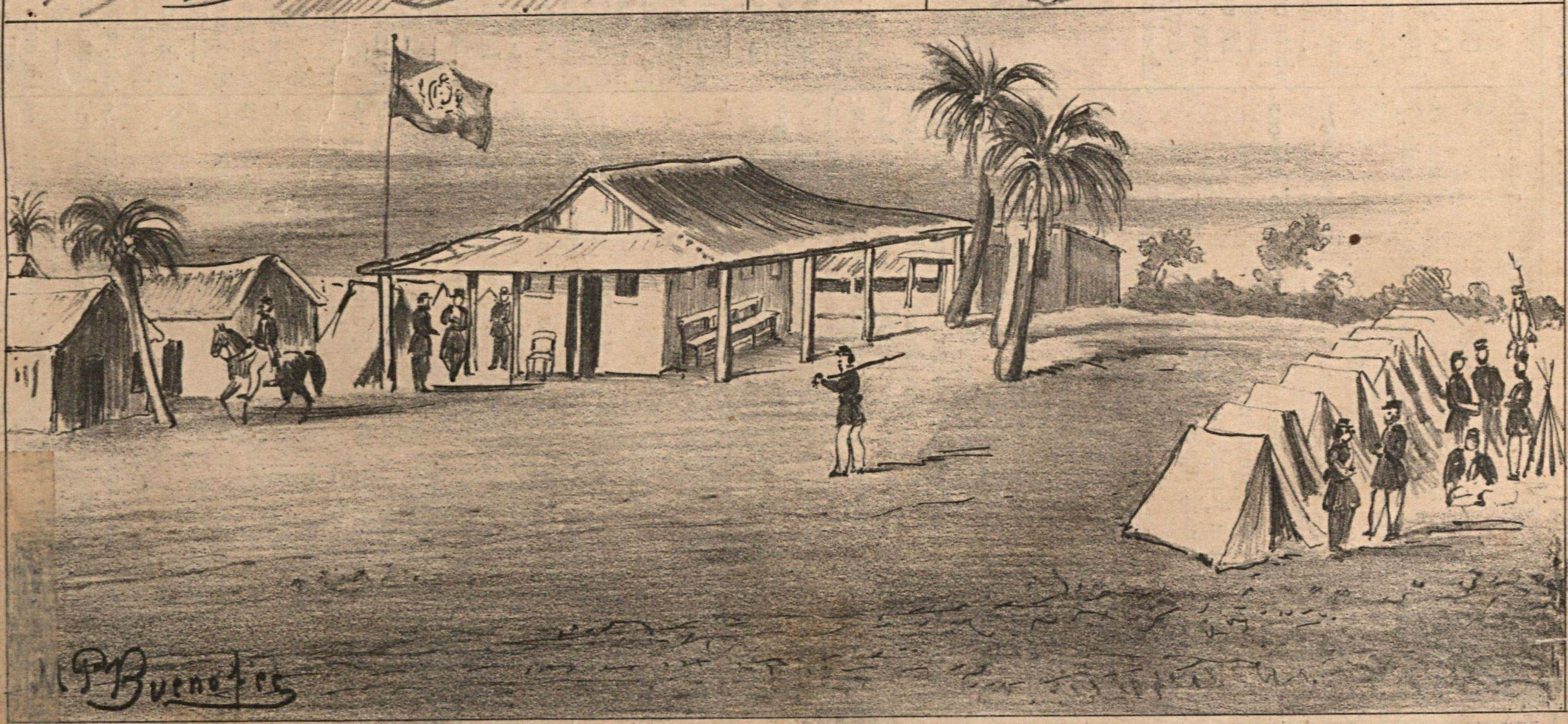 Residência de S. Ex. o Marquês de Caxias em Tuyuty, República do Paraguai